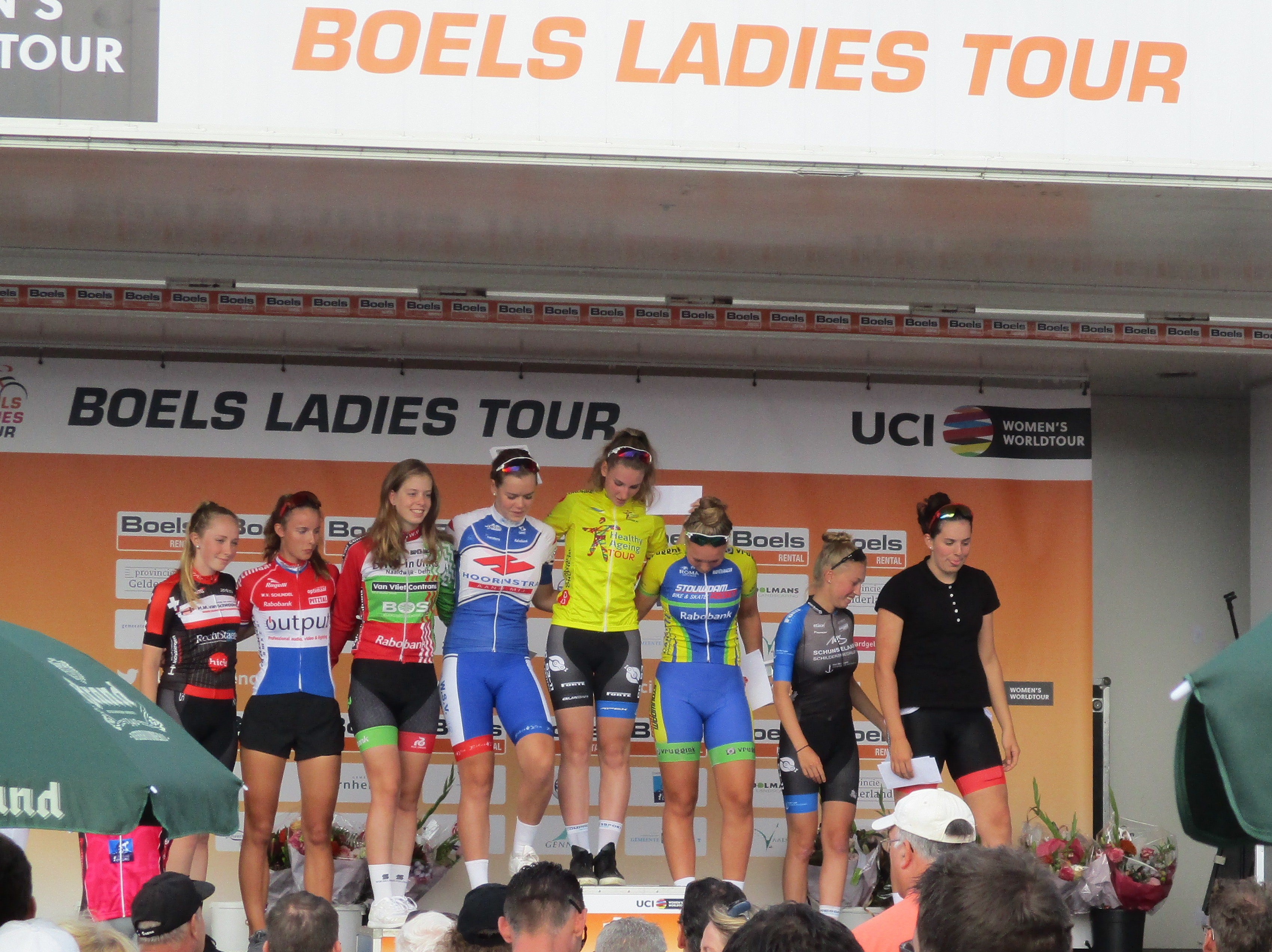 Huldiging van de wedstrijd voor junioren, na de finish van de laatste etappe van de Boels Ladies Tour 2017 op het Tom Dumoulin Bike Park in Sittard-Geleen.